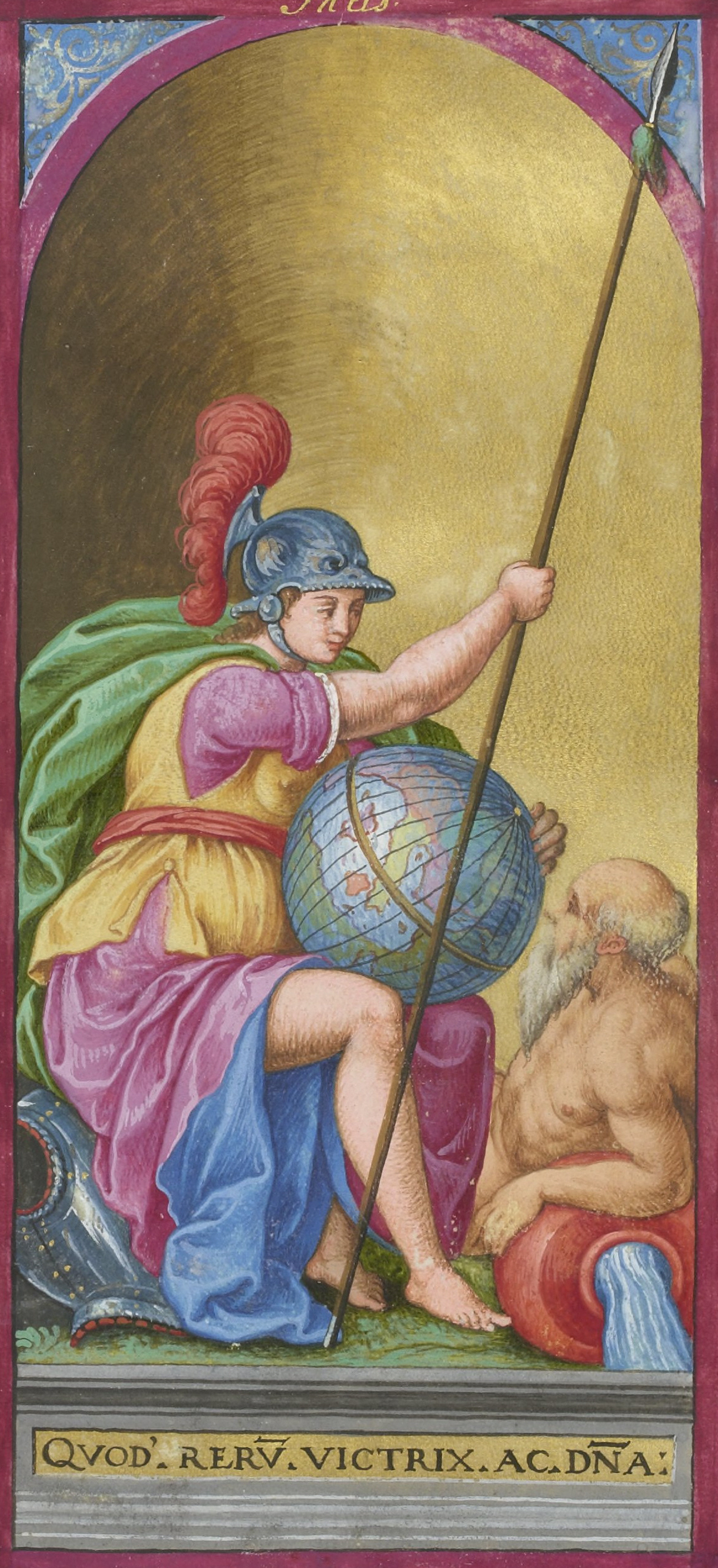 Voyages et aventures de Ch. Magius, Bibliothèque nationale de France, département Estampes et photographie, RESERVE 4-AD-134, detail de la miniature no. 9; Personnification de la Rome antique